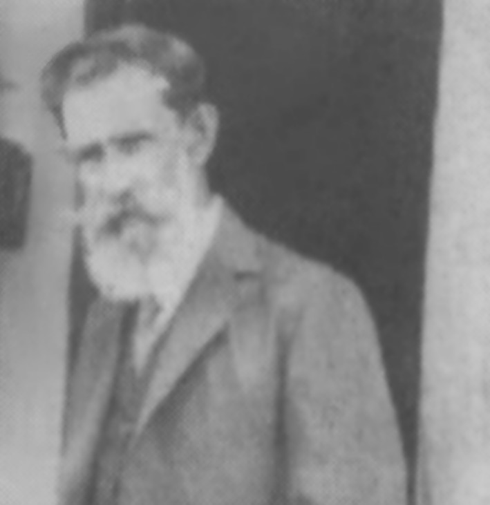 Coronel Manuel Fabrício (1854-1939)